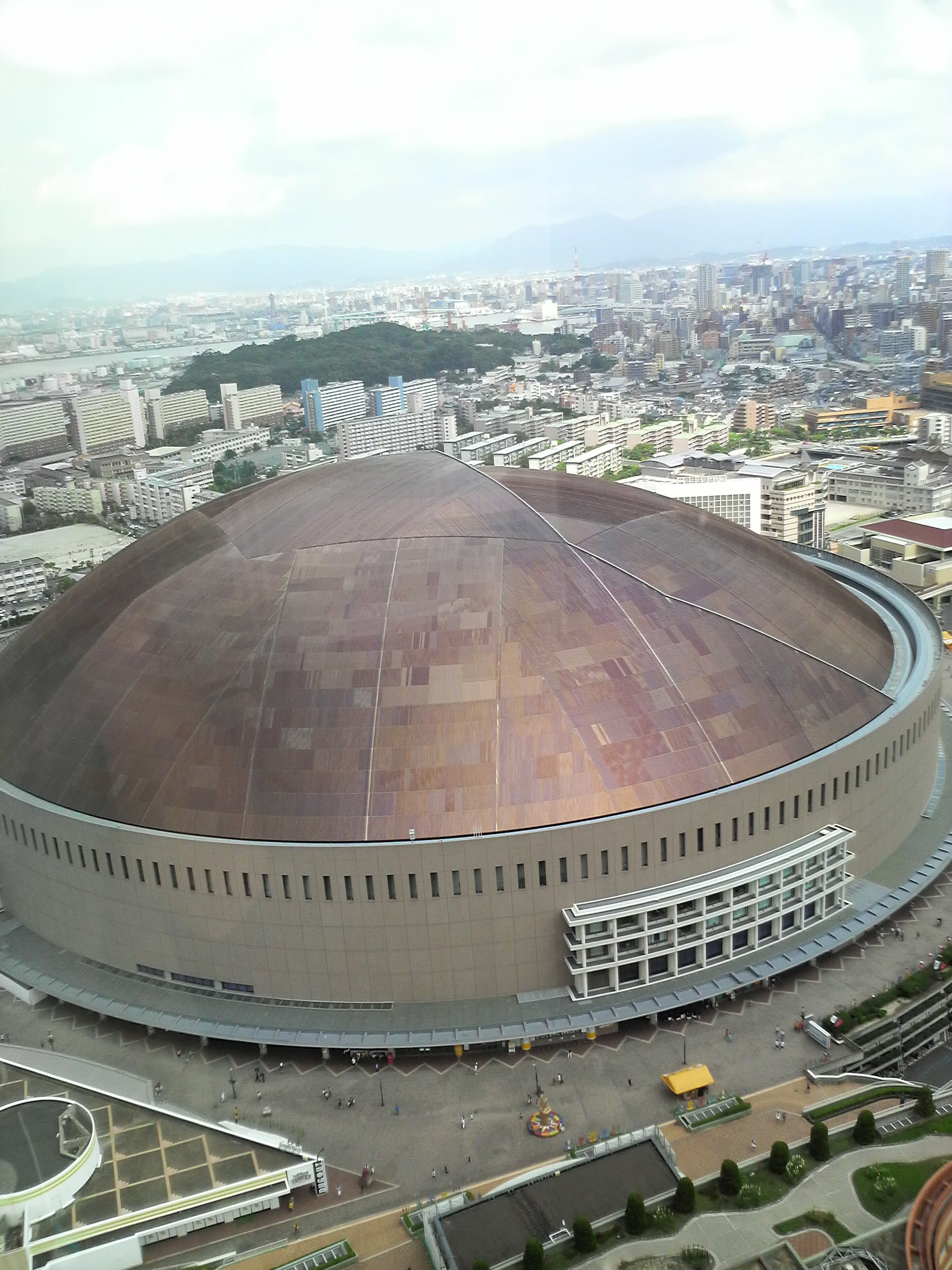 JALシーホークリゾートホテル最上階から撮影した福岡Yahoo!JAPANドーム。1994年度グッドデザイン賞受賞（建築・環境デザイン部門）。